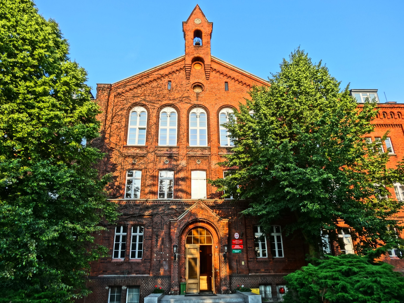 Budynek Bernardyńska 6 Bydgoszcz, Ewangelickie Seminarium Nauczycielskie 1880, ob. Wydział Rolniczy Uniwersytetu Technologiczno-Przyrodniczego